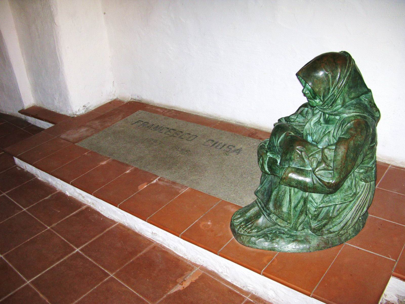 La tomba di Francesco Ciusa e la sua opera "la madre dell'ucciso"